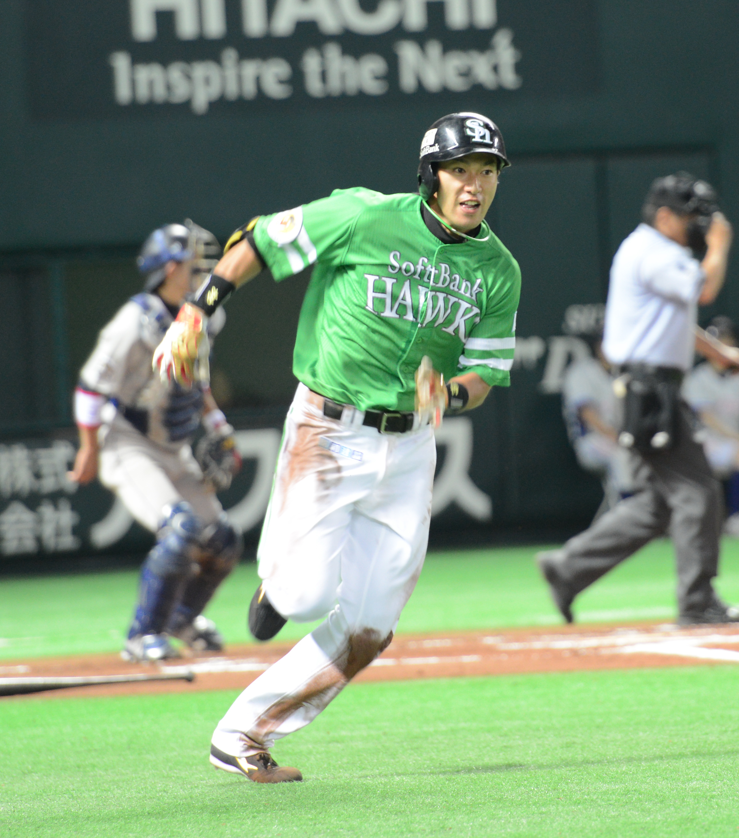 柳田 悠岐（やなぎた ゆうき）は、福岡ソフトバンクホークス に所属するプロ野球選手（外野手）。